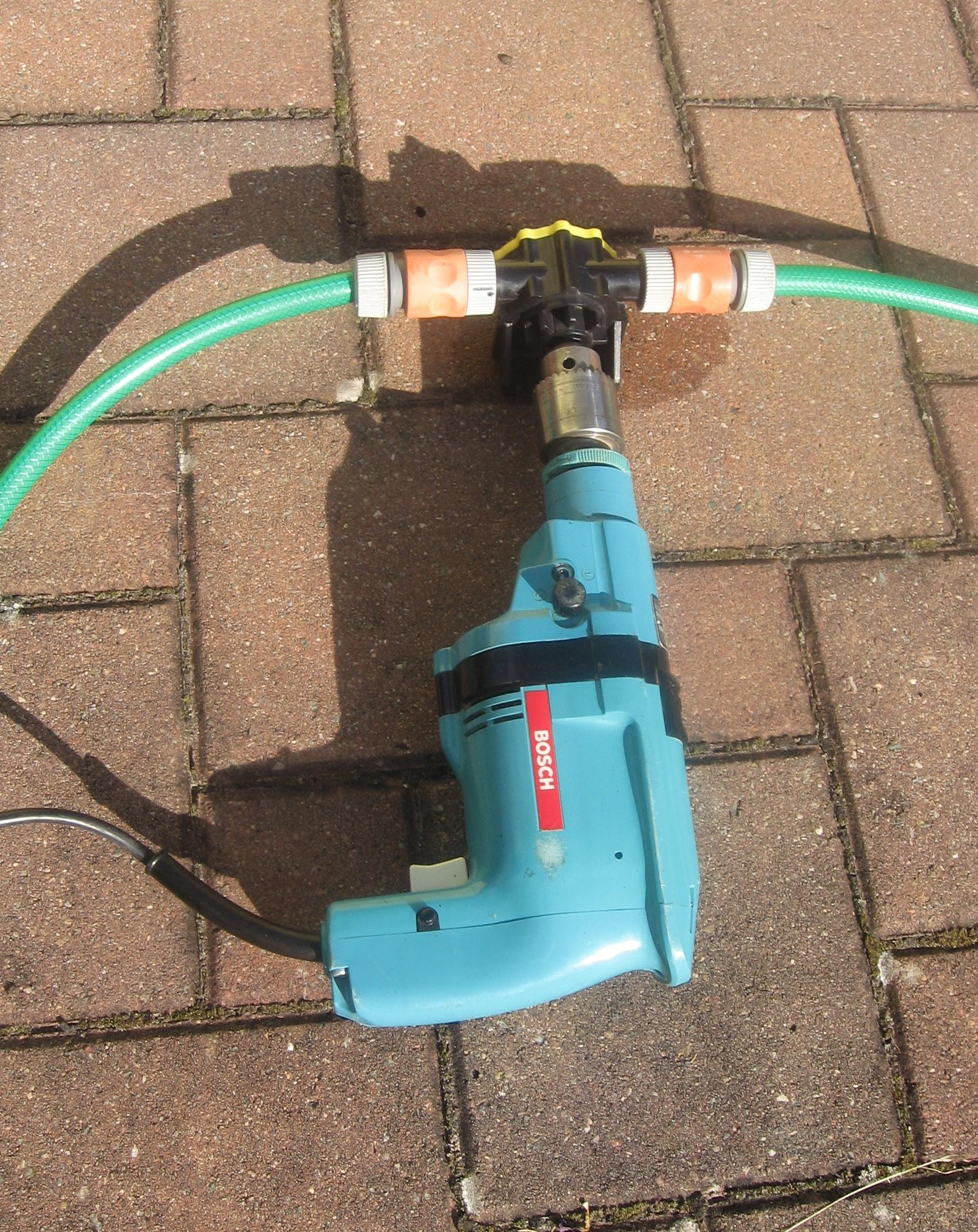 Bohrmaschinenpumpe